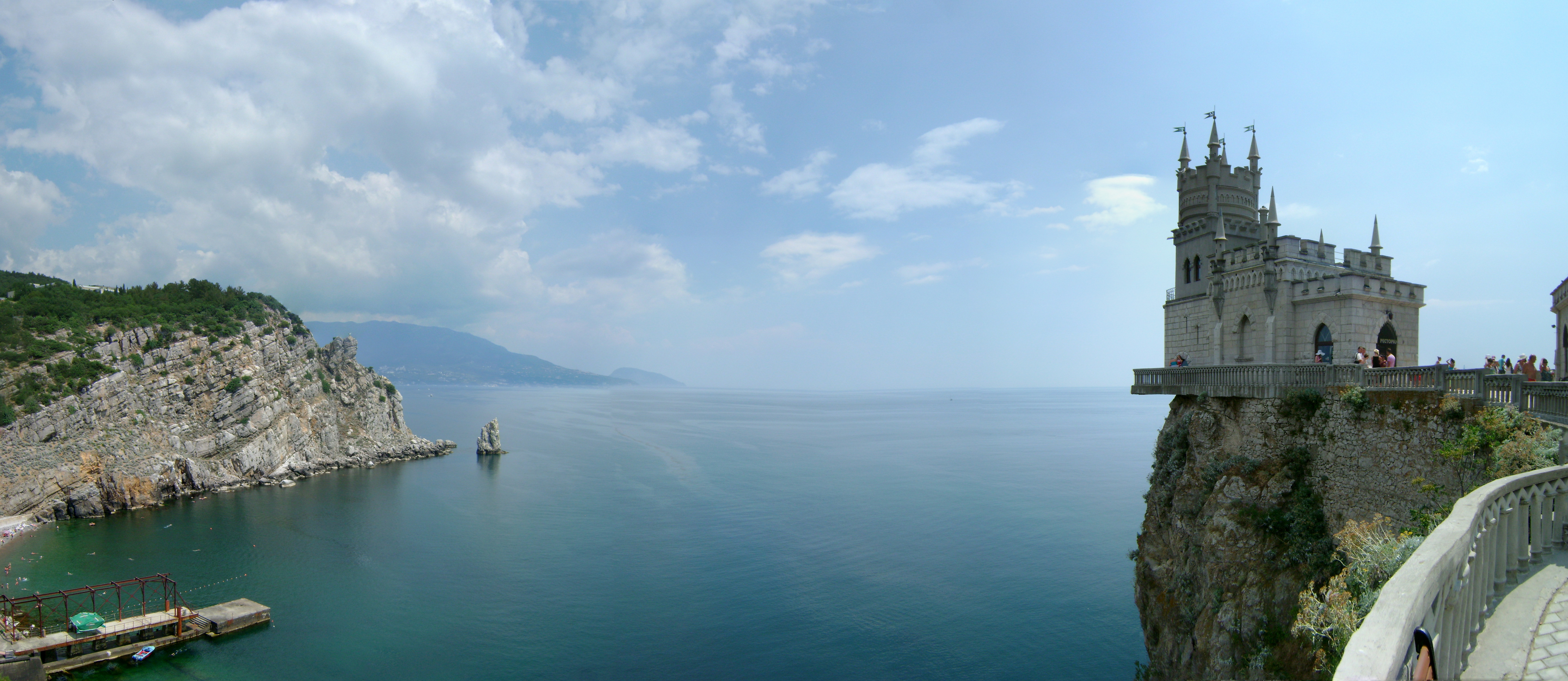 Палац «Ластівчине гніздо», Гаспра, вул. Алупкінське шосе, 9, літер «А»